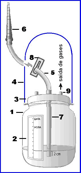 Componentes: Frasco coletor (1), Etiqueta volumÃ©trica graduada (2), Tampa (3), AlÃ§a de transporte (4), Tubo de drenagem (5), Conector cÃ´nico (6), Tubo selo dâ€™Ã¡gua (7), Presilha (8),Respiro da saÃ­da de gases (9)